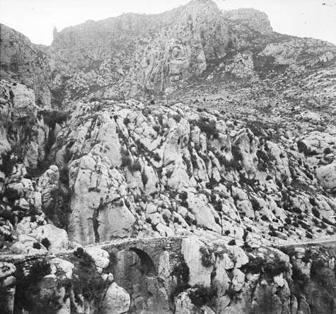 Imatge